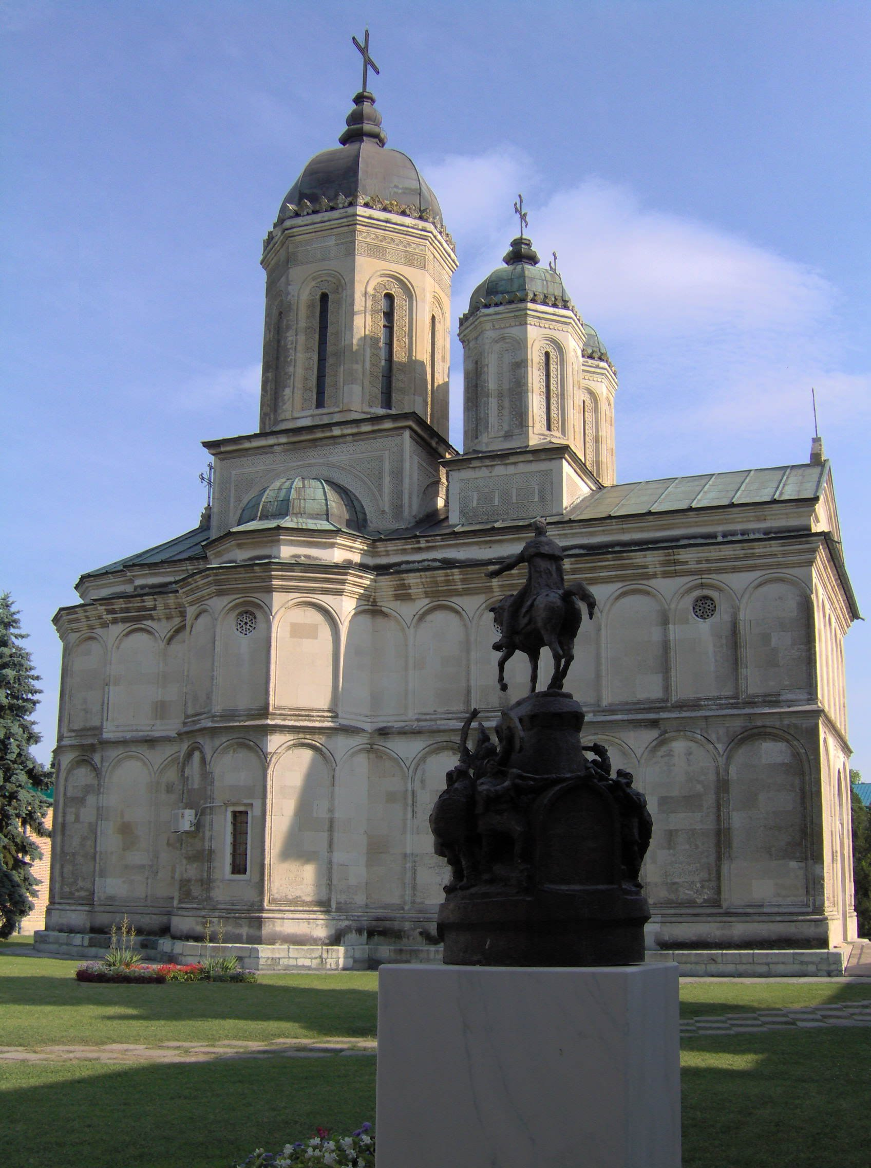 Mănăstirea Dealu 01